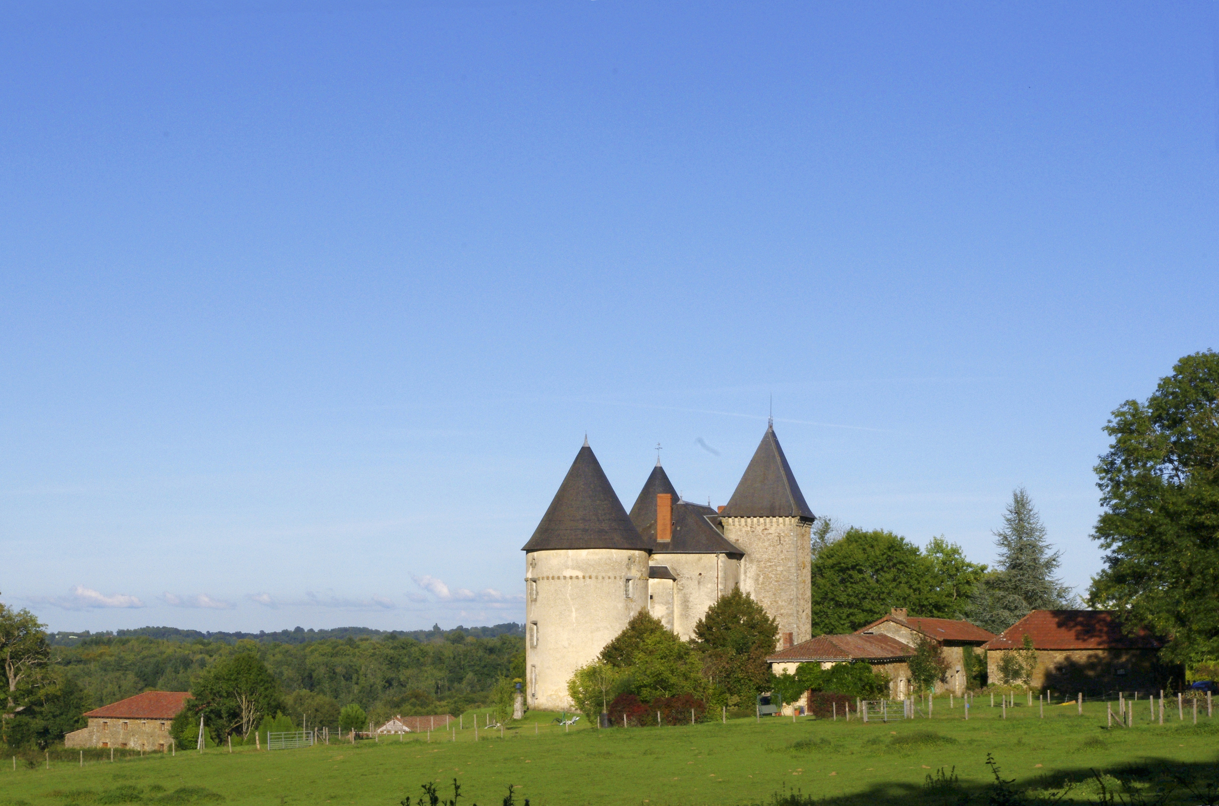 Portail du château de Brie, commune de Champagnac-la-Rivière, Haute-Vienne, France